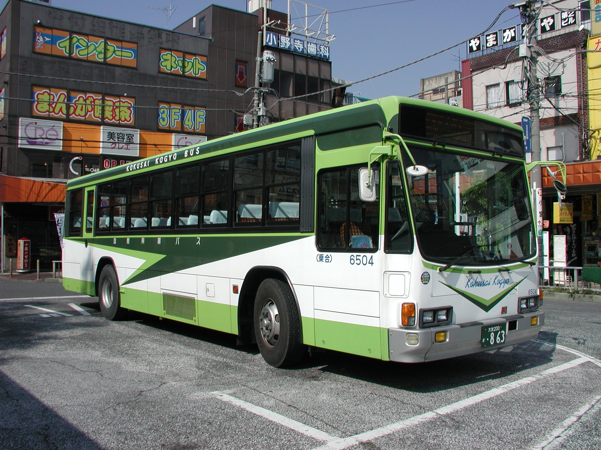 国際興業一般路線塗装 用途外向け車両（社号：6504/いすゞ・キュービック：KC-LV280N/元：淡路交通） 蕨駅西口にて